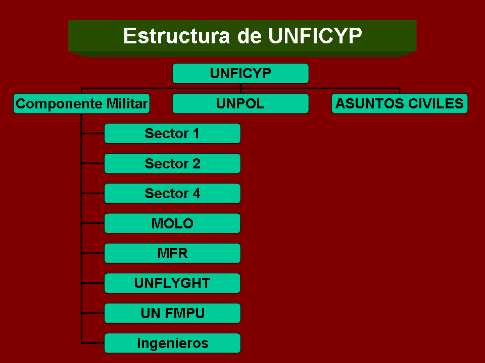 Organización vigente de UNFICYP